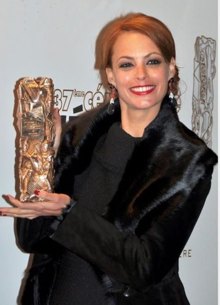 Bérénice Bejo à la cérémonie des César